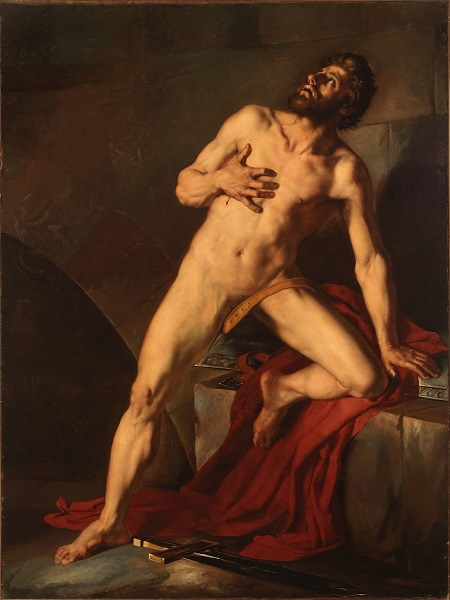 Il gladiatore ferito, olio su tela, 149 x 199 cm., Musei civici, Piacenza